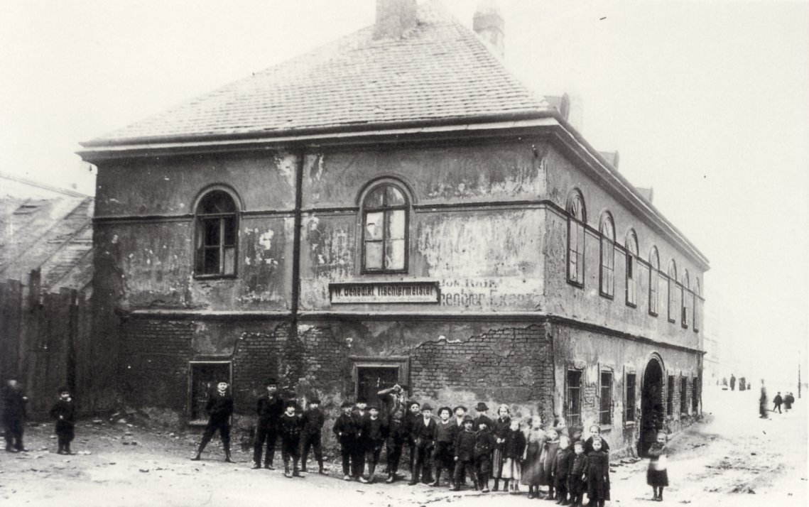 Der Rote Hof vom heutigen Reumannplatz aus gesehen, Buchengasse 67, Wien-Favoriten